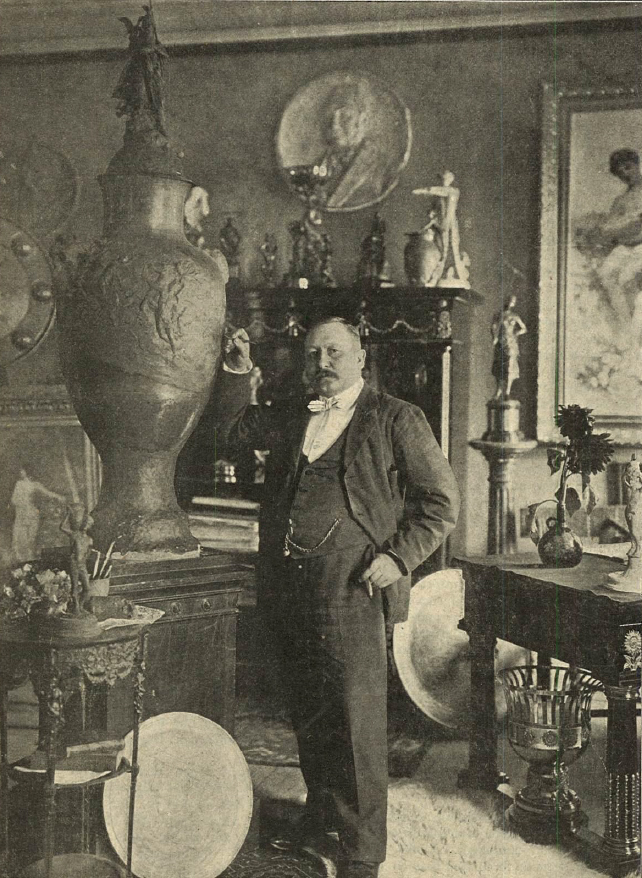 Hjalmar Norrström i ateljen på Majorsgatan 12